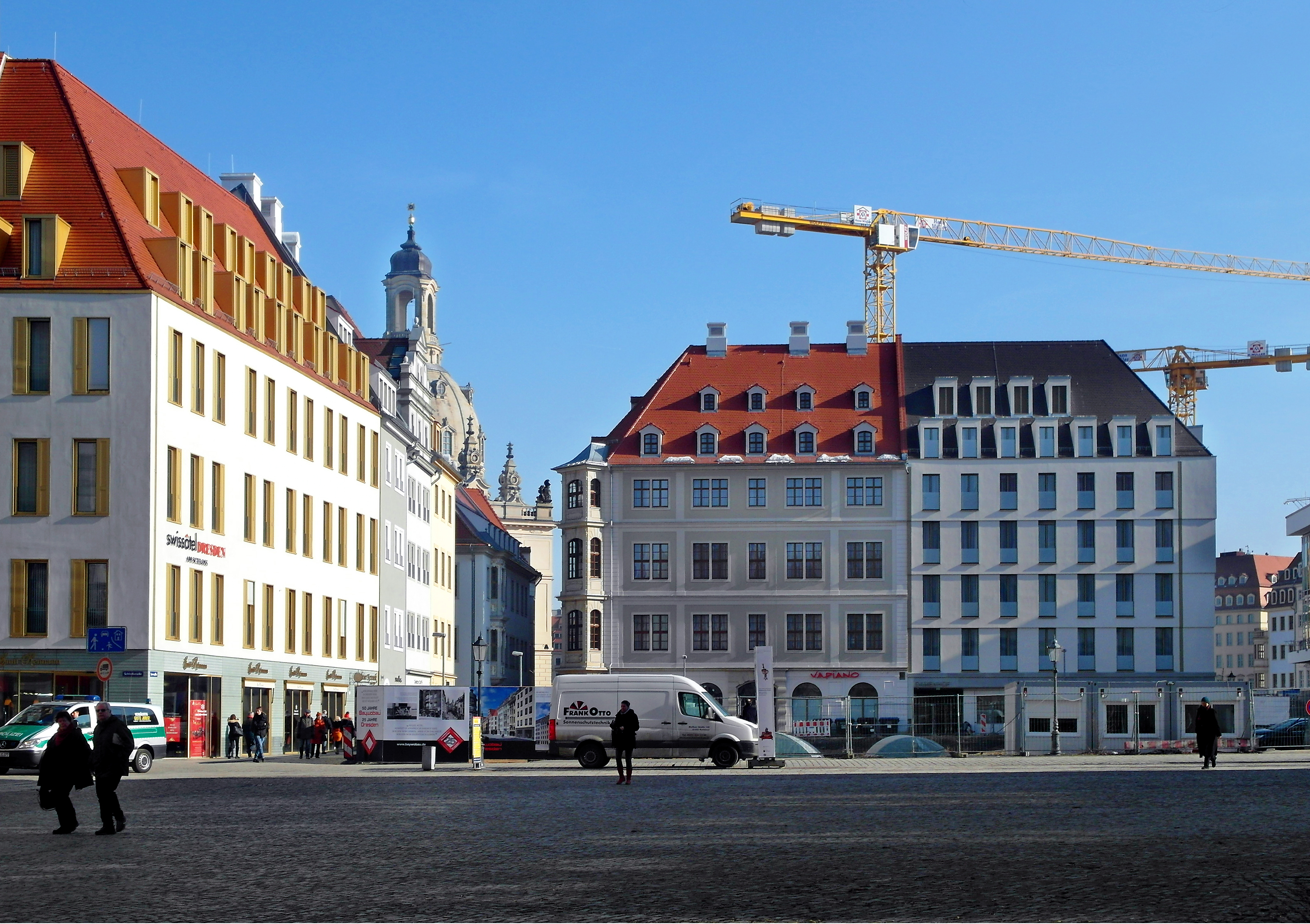 13.02.2017 01067 Dresden-Altstadt: Blick vom Taschenberg zur Ecke Schloßstraße / Sporergasse 1, 3, 5 (zum Schloßhotel = SWISSOTEL gehörend). Durchblick zur Frauenkirche. Rechts die gerade errichteten Gebäude vom Jüdenhof, Quartier VII: Schössergasse 14 / Ecke Sporergasse (VAPIANO) und ganz rechts das Haus Schössergasse / Ecke Rosmaringasse. Diese Sicht wird später verbaut sein. [SAM8305.JPG]20170213230DR.JPG(c)Blobelt